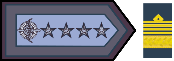 Manga y charretera de Brigadier General de la Fuerza Aérea Argentina.